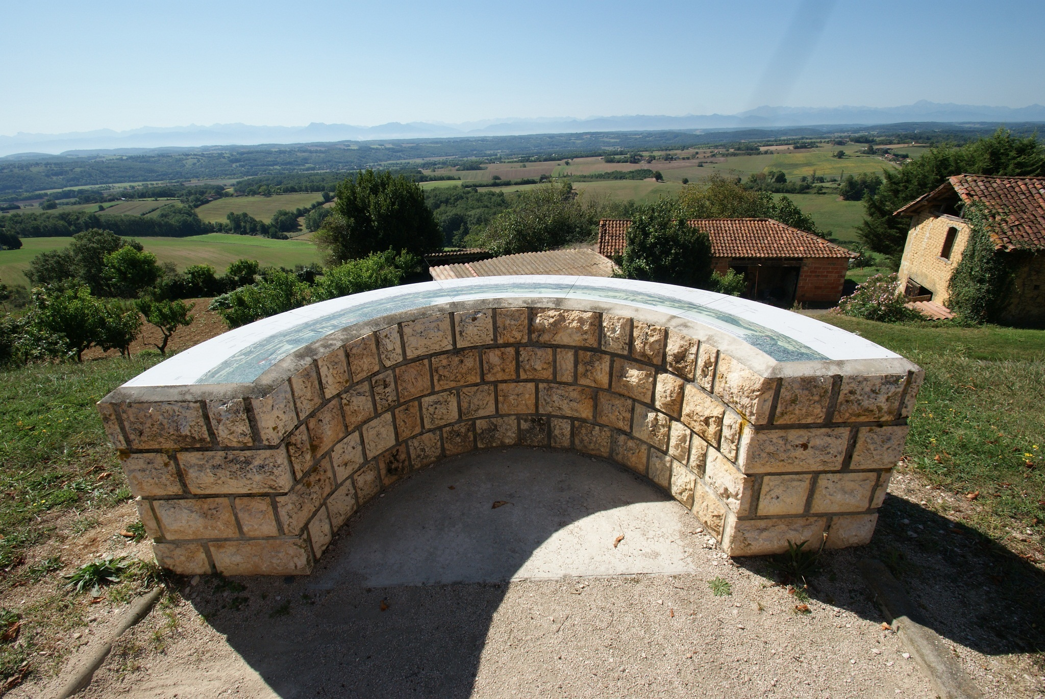 In het dorpje Mondilhan in de Haute-Garonne Frankrijk is een uitzichtpunt van waar men de Pyreneëen kan overzien. Deze tafel is daarbij een gids.